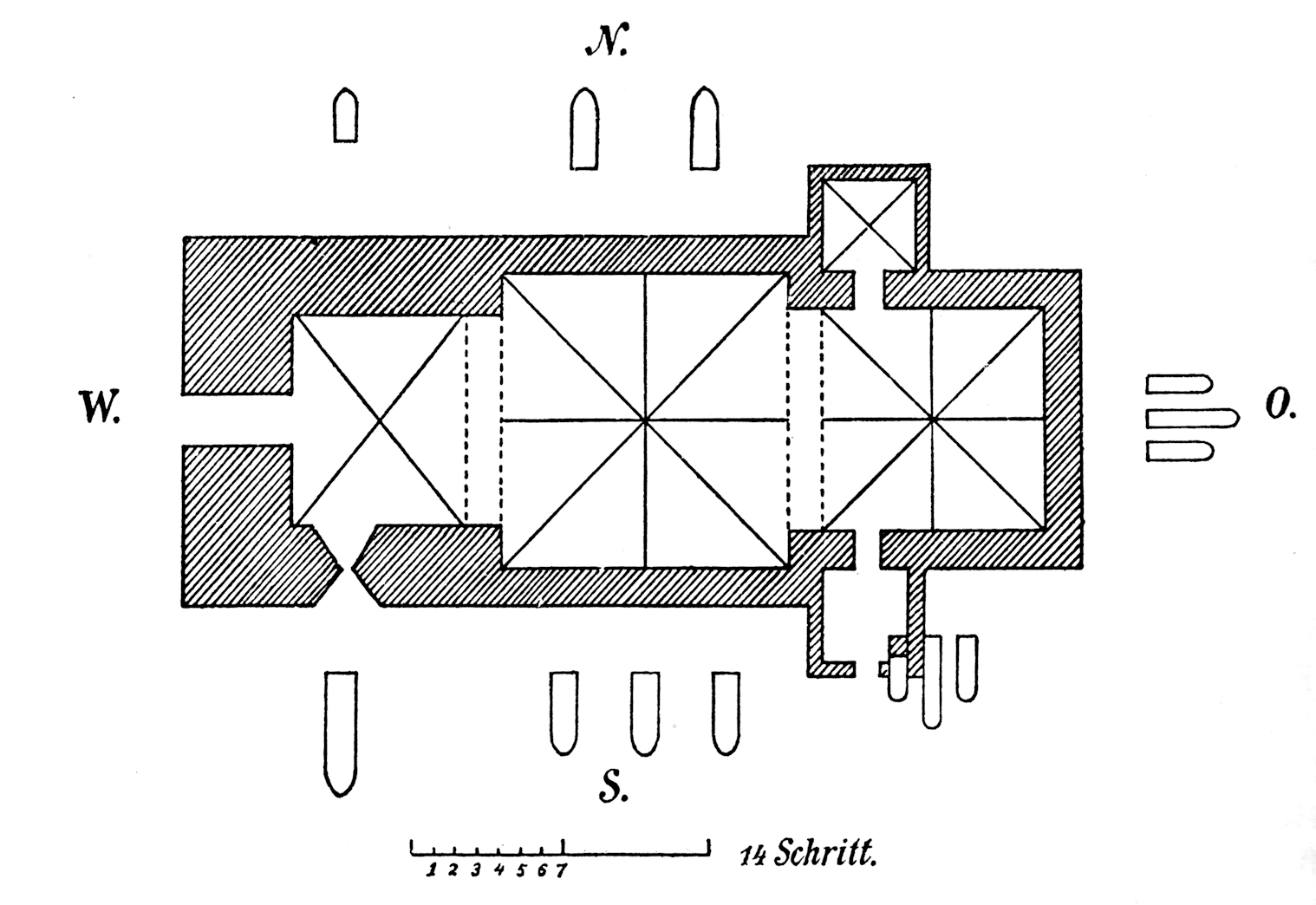 Gewölbe- und Fensterordnung der Kirche zu Sanitz (Mecklenburg)